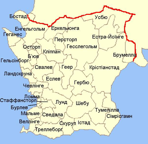 Карта адміністративного поділу лену Сконе у Швеції. Карту створено на основі карти File:Skåne County.png.